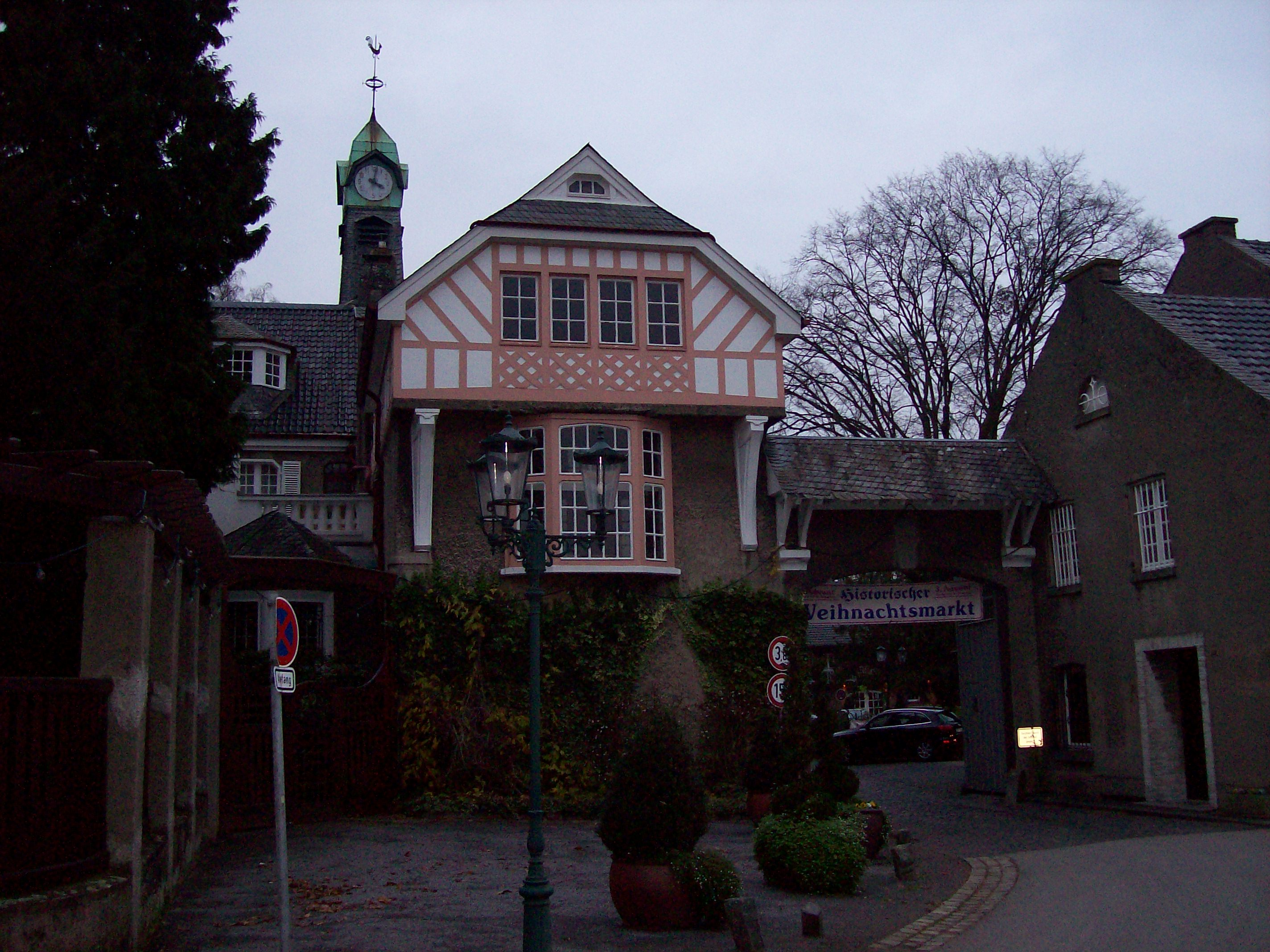 Rittergut Birkhof (Korschenbroich), Germany